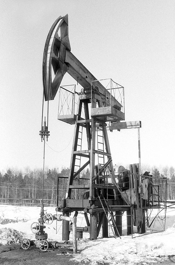 Petroleum_drill near Surgut, Russia (2000)